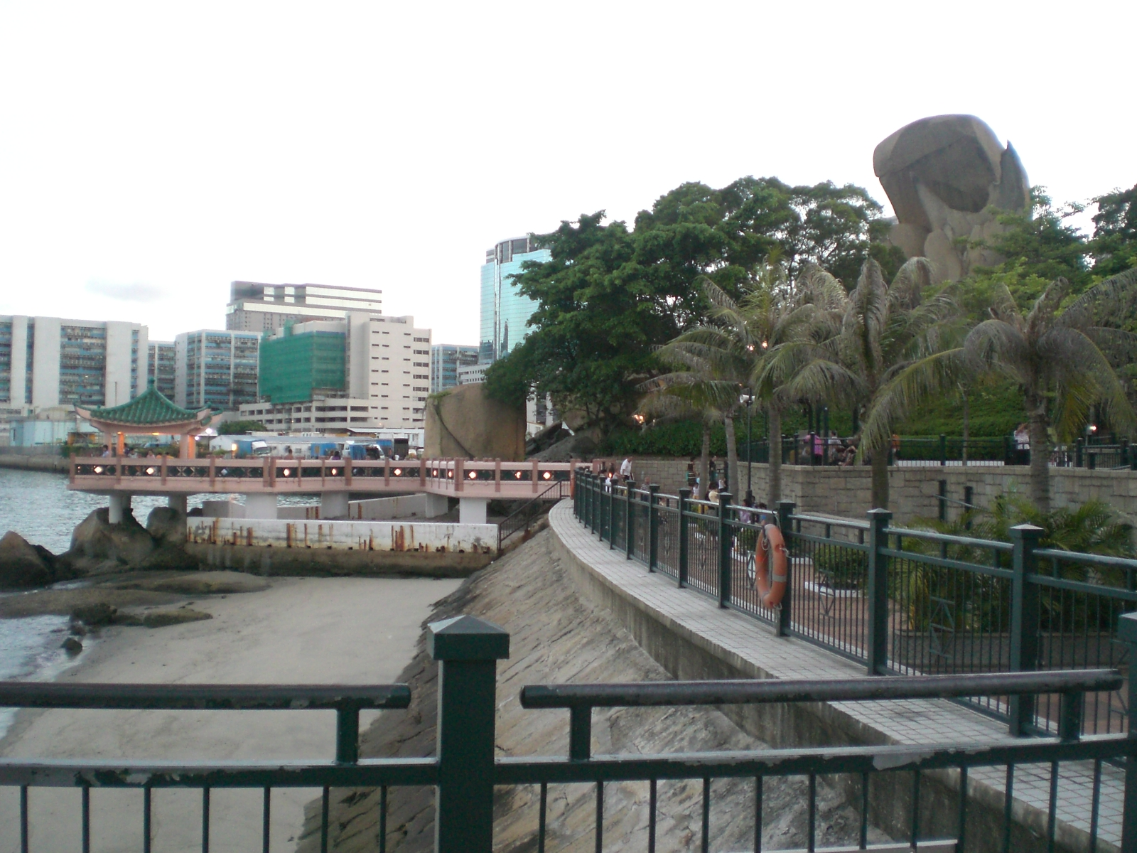 土瓜灣海心公園